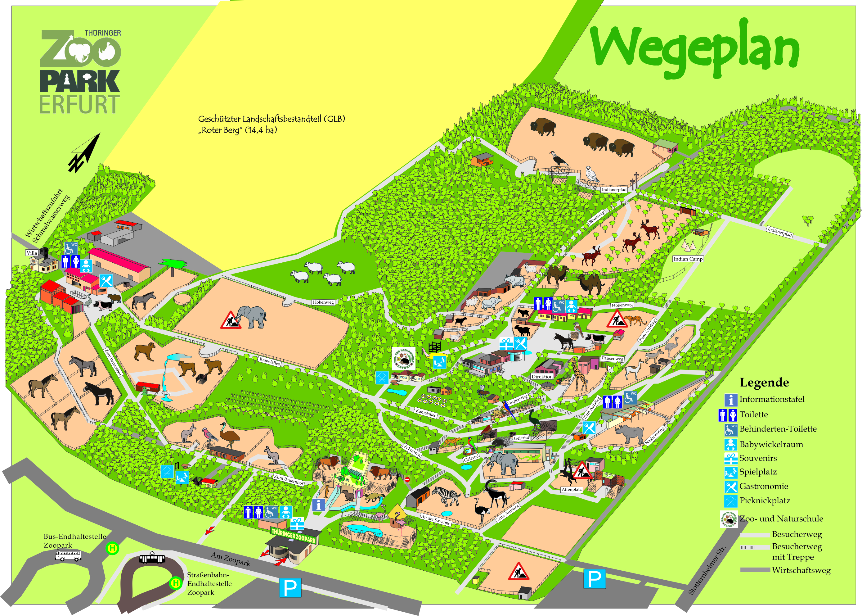 Zooplan Thüringer Zoopark